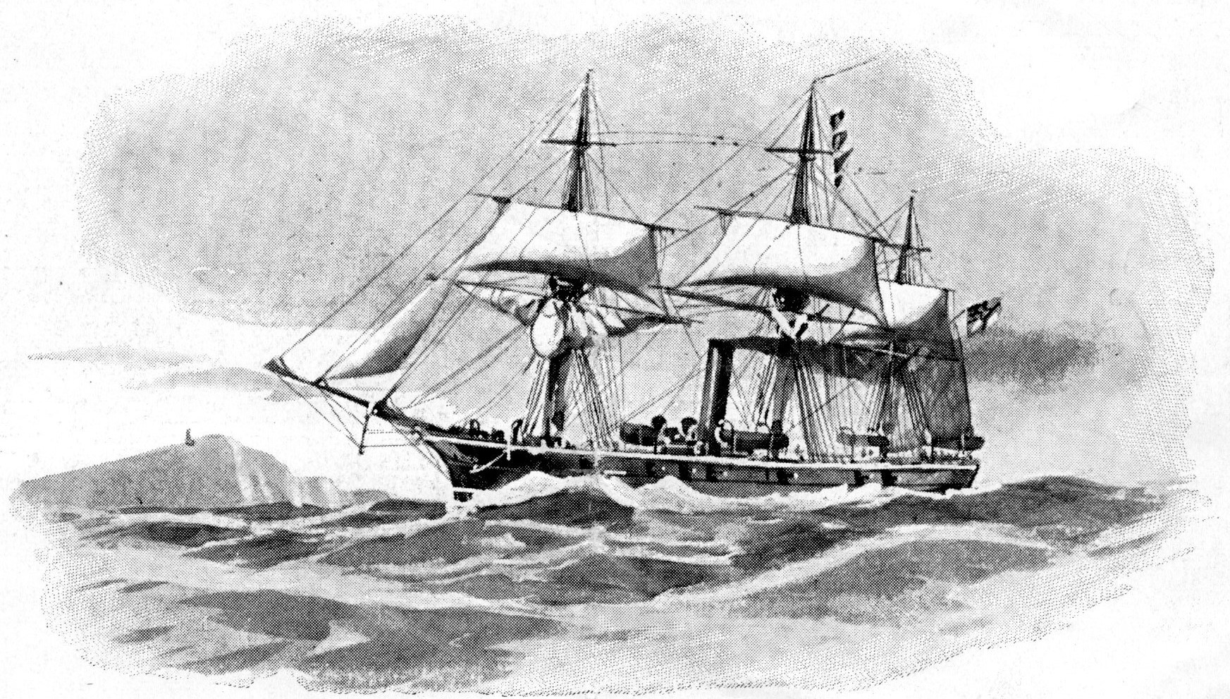 SMS AUGUSTA. Zeichnung von 1907, Meyers Großes Konversations-Lexikon Bd. 17